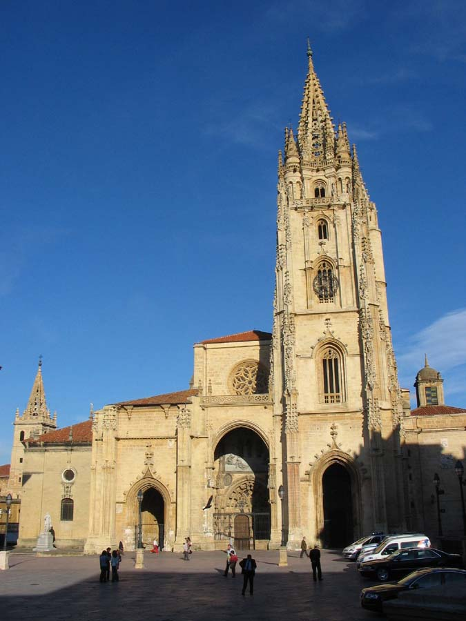 Descripción: Catedral de Oviedo, Asturias, España. Fuente: Foto tomada por Rodrigouf el 21 de octubre de 2005.